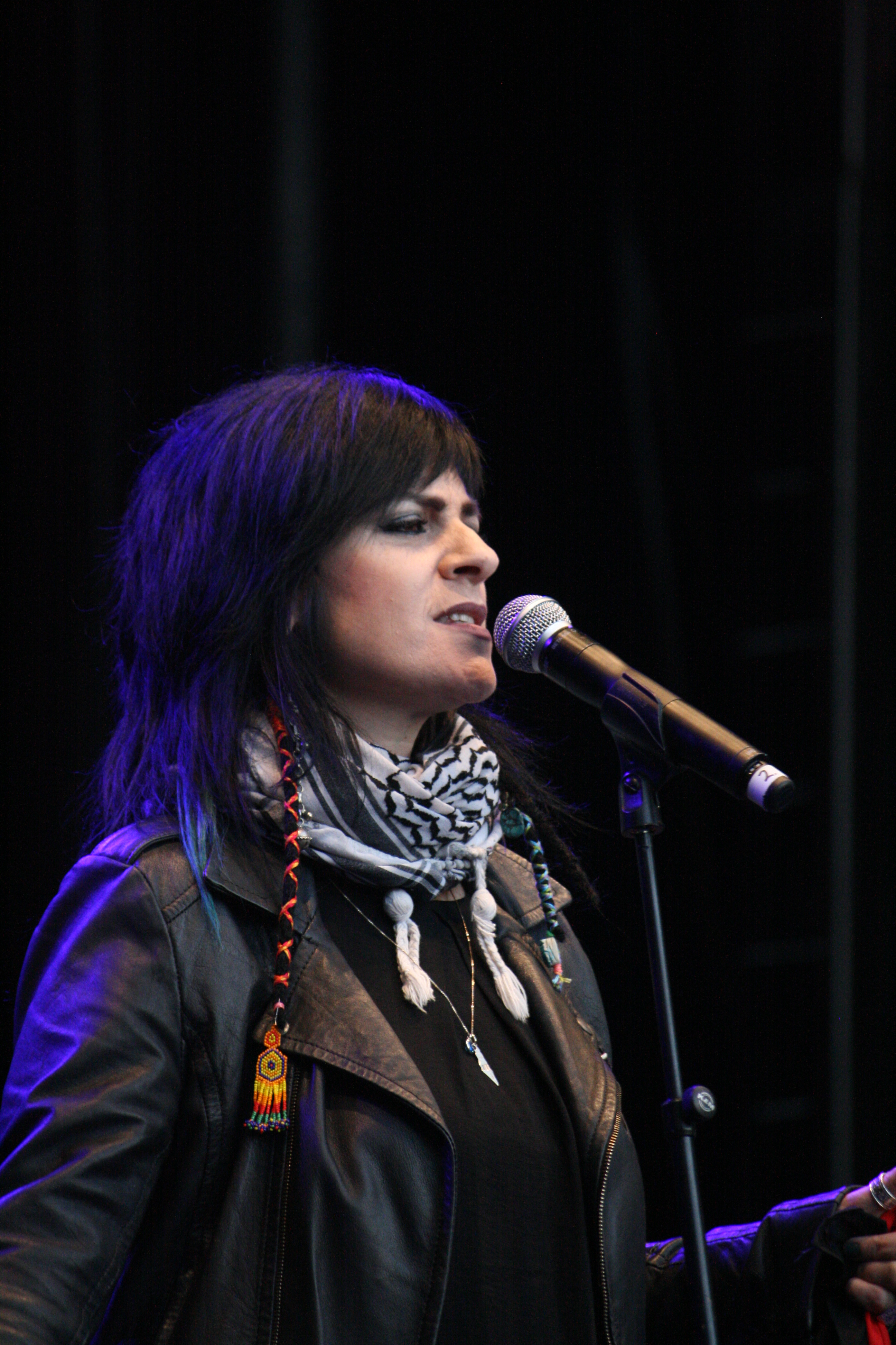 Musikk for Gaza, Oslo 3.9.2014